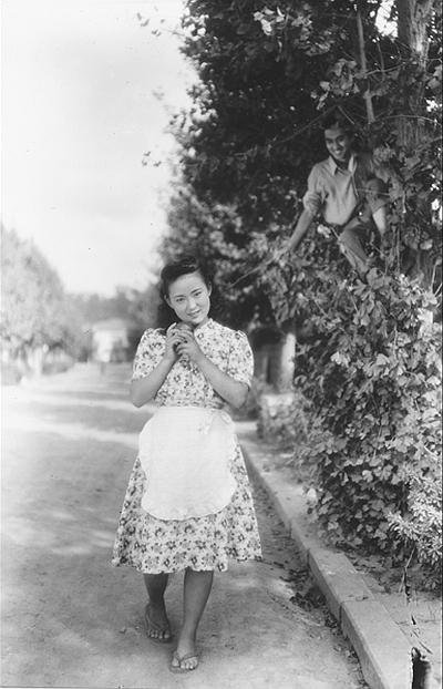 映画『そよかぜ』の並木路子